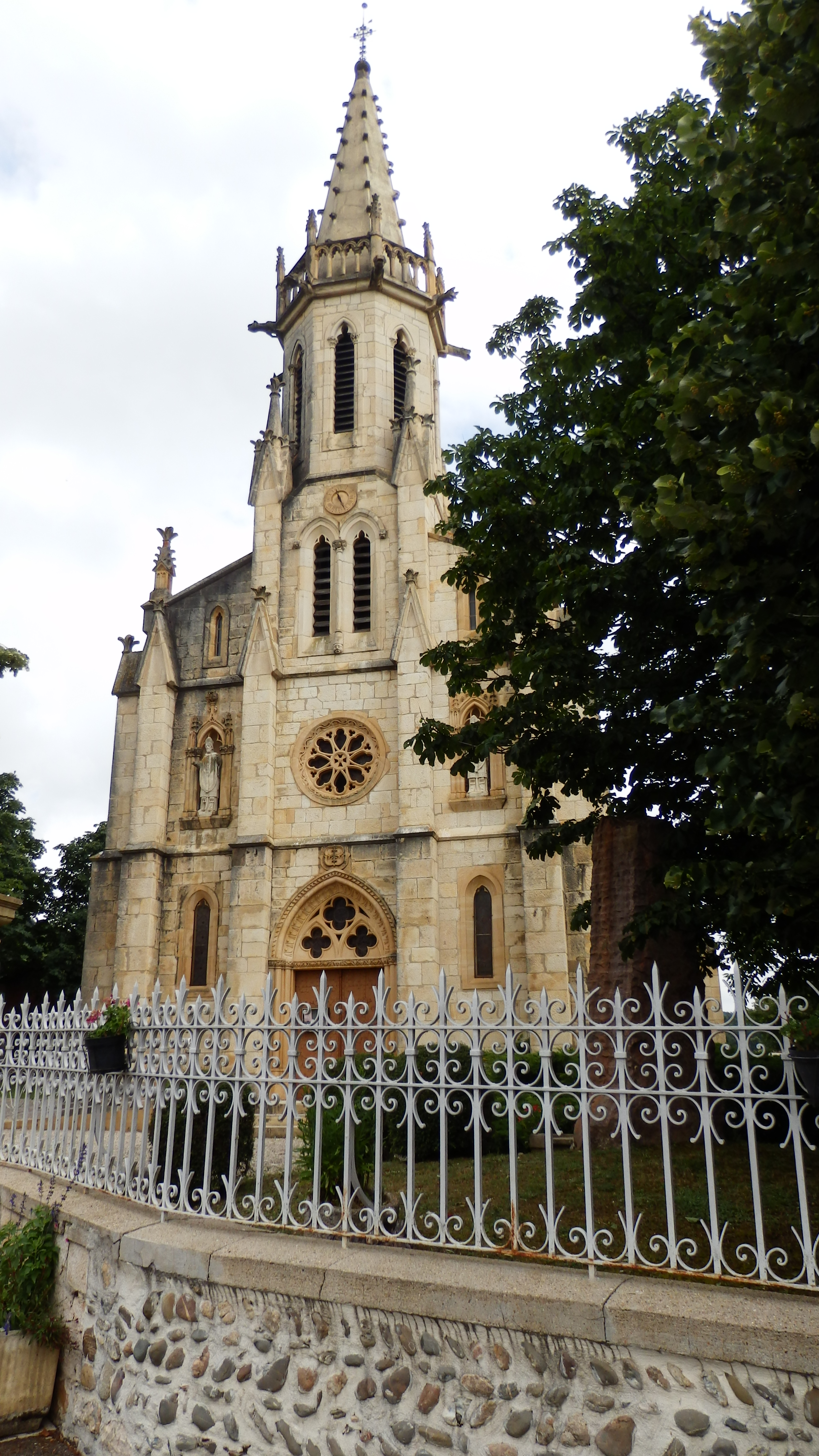 église en calcaire construite en 1878 à Sana. Près de la mairie.